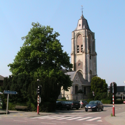 Propra foto, farita dum ekskurso, sabate la 28-an de majo 2005.